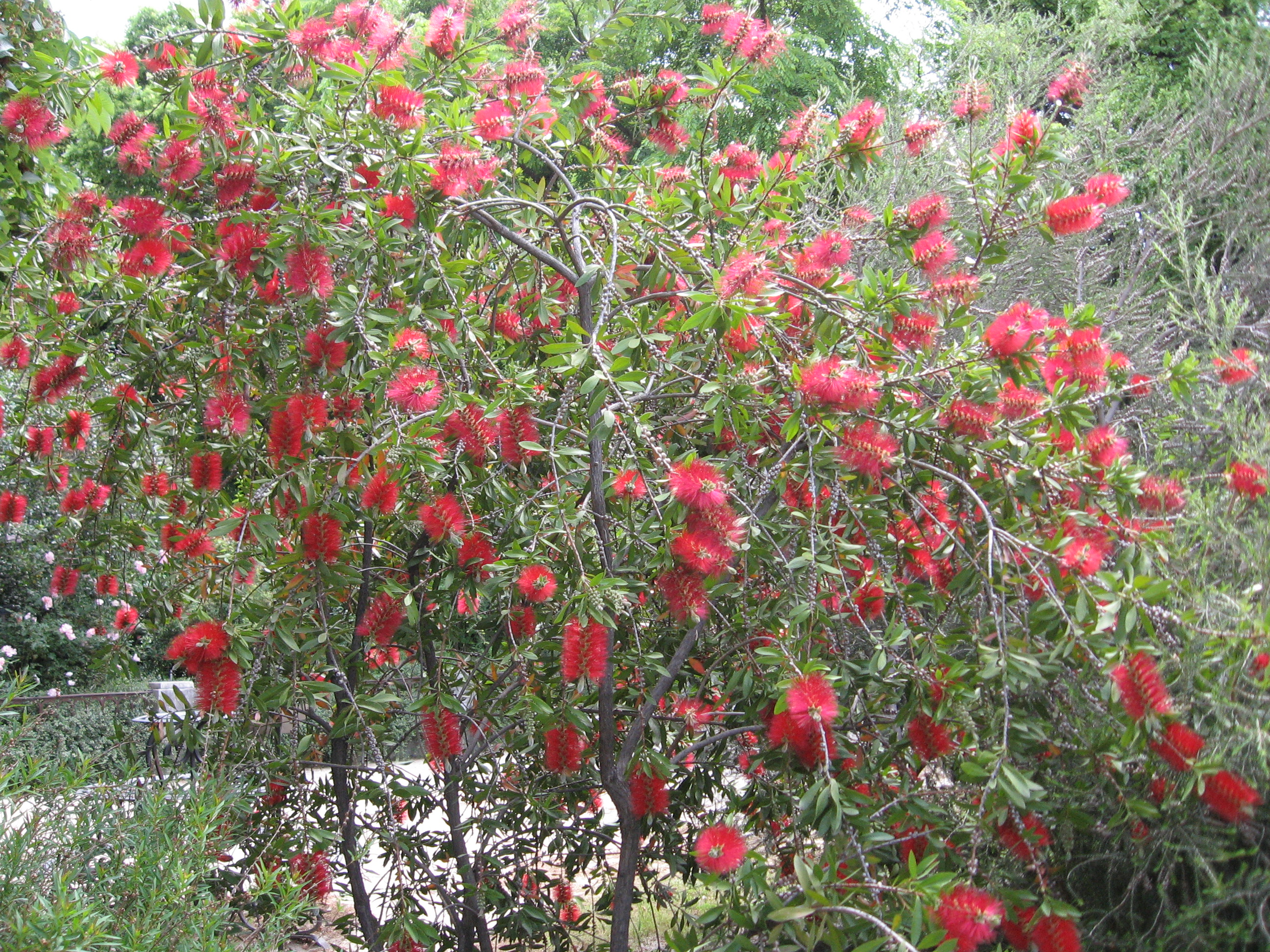 Callistemon comboynensis. Real Jardín Botánico de Madrid.